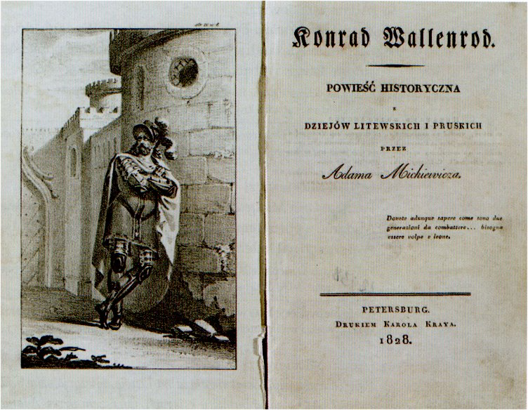 Беларуская (тарашкевіца): Першыя старонкі выданьня Конрада Валенрода, Пецярбург (1828)